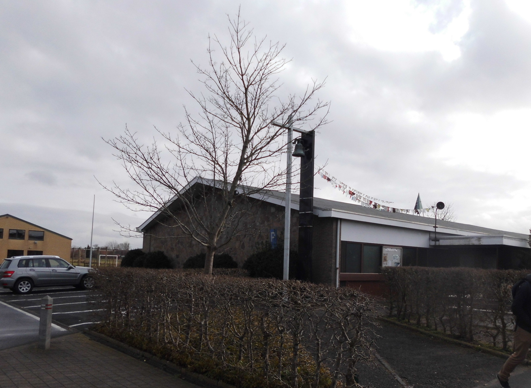 Hulpkapel toegewijd aan de Goede Herder - Herderstraat - Goede -Herder - Torhout - West-Vlaanderen - België